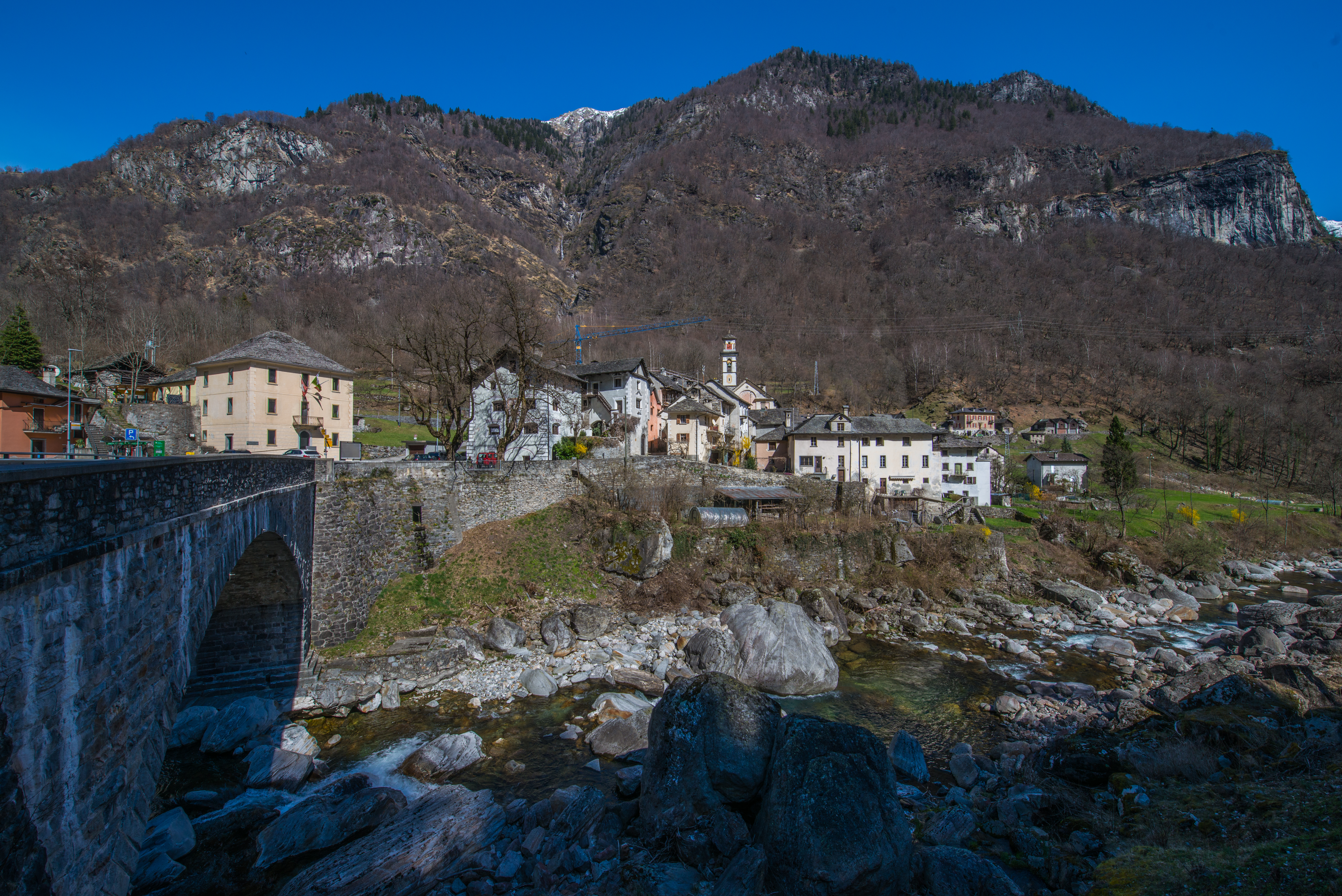 Prato-Sornico mit Sornico ist eine Fraktion der politischen Gemeinde Lavizzara im Kreis Lavizzara, im Bezirk Vallemaggia des Kantons Tessin in der Schweiz.